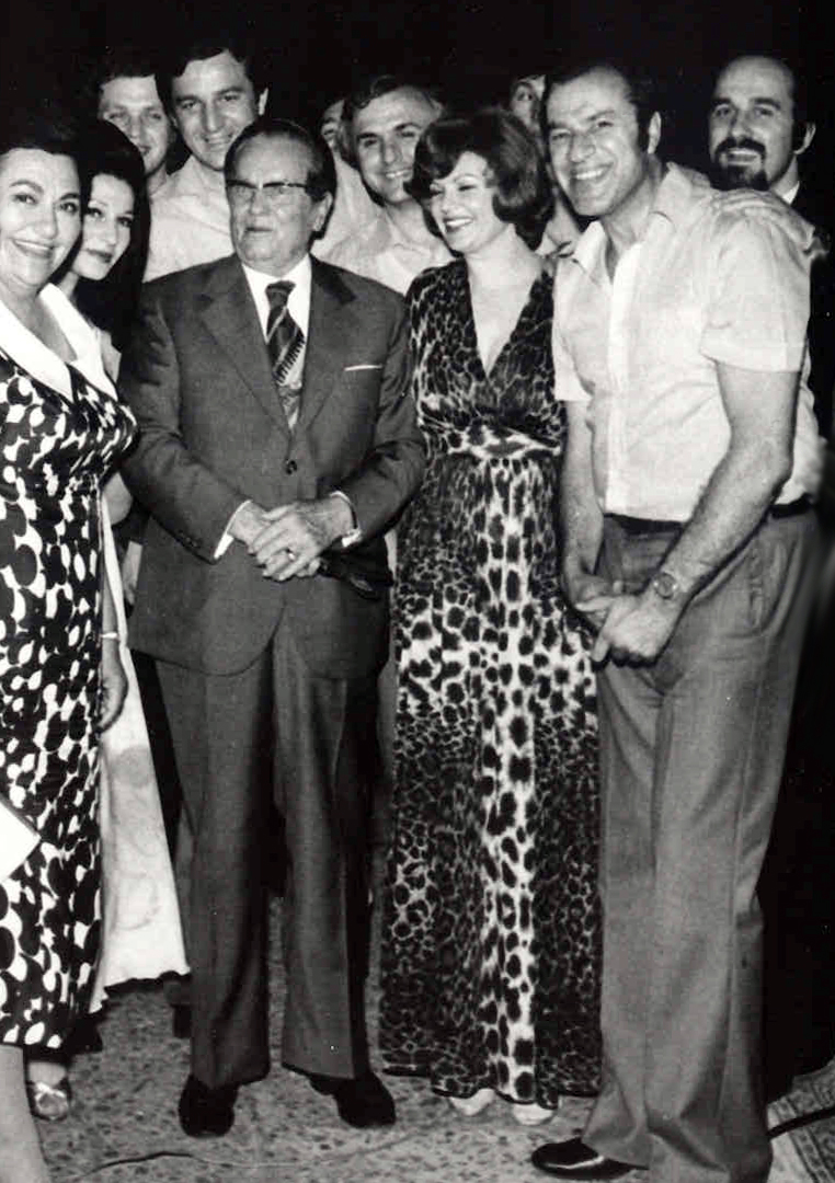 Srpskohrvatski / српскохрватски: Boki је 30 godina redovno svirao predsedniku Titu i Jovanki Broz, kao i gostima diplomatama celog sveta na Brionima, Belom dvoru, Saveznom izvršnom veću, Bledu, Karađorćevu, Starom dvoru ...).